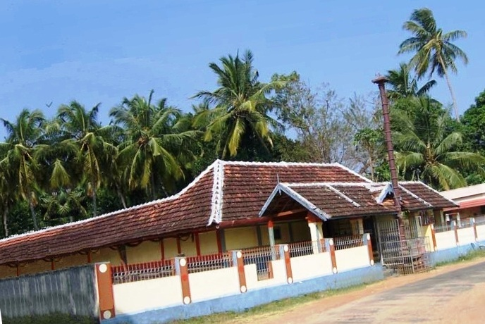 പൊക്കുന്നിയപ്പൻ ക്ഷേത്രം-ആലത്തിയൂർ, പാലക്കാട്